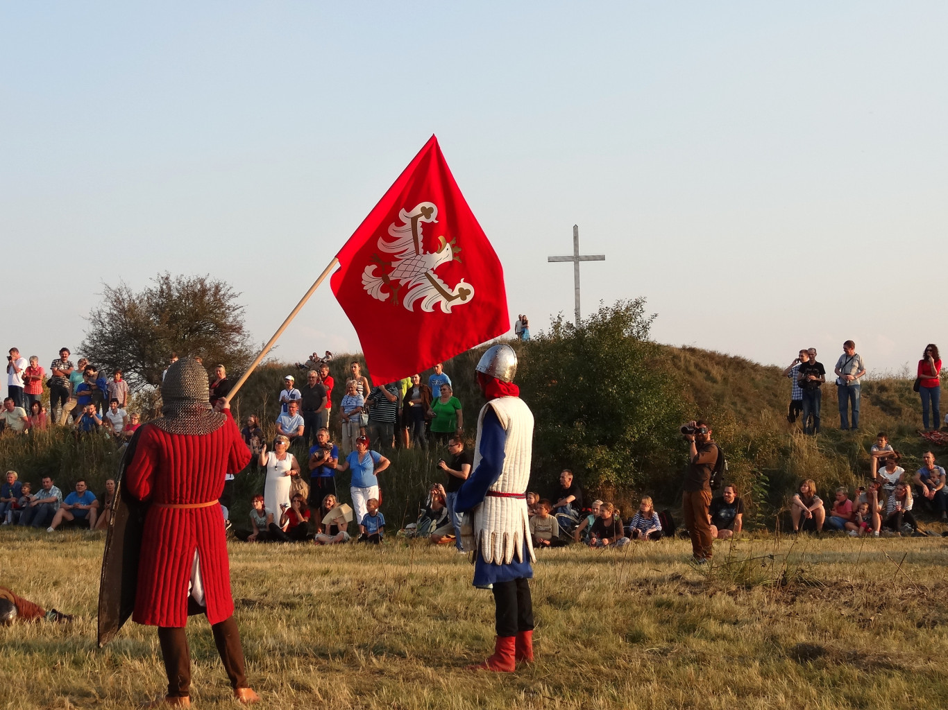 Inscenizacja historyczna na terenie grodziska Wyszogród w Bydgoszczy. „Wyszogród – zanim powstała Bydgoszcz”. III edycja. Bitwa o Wyszogród 1113 r. wg Kroniki Galla Anonima